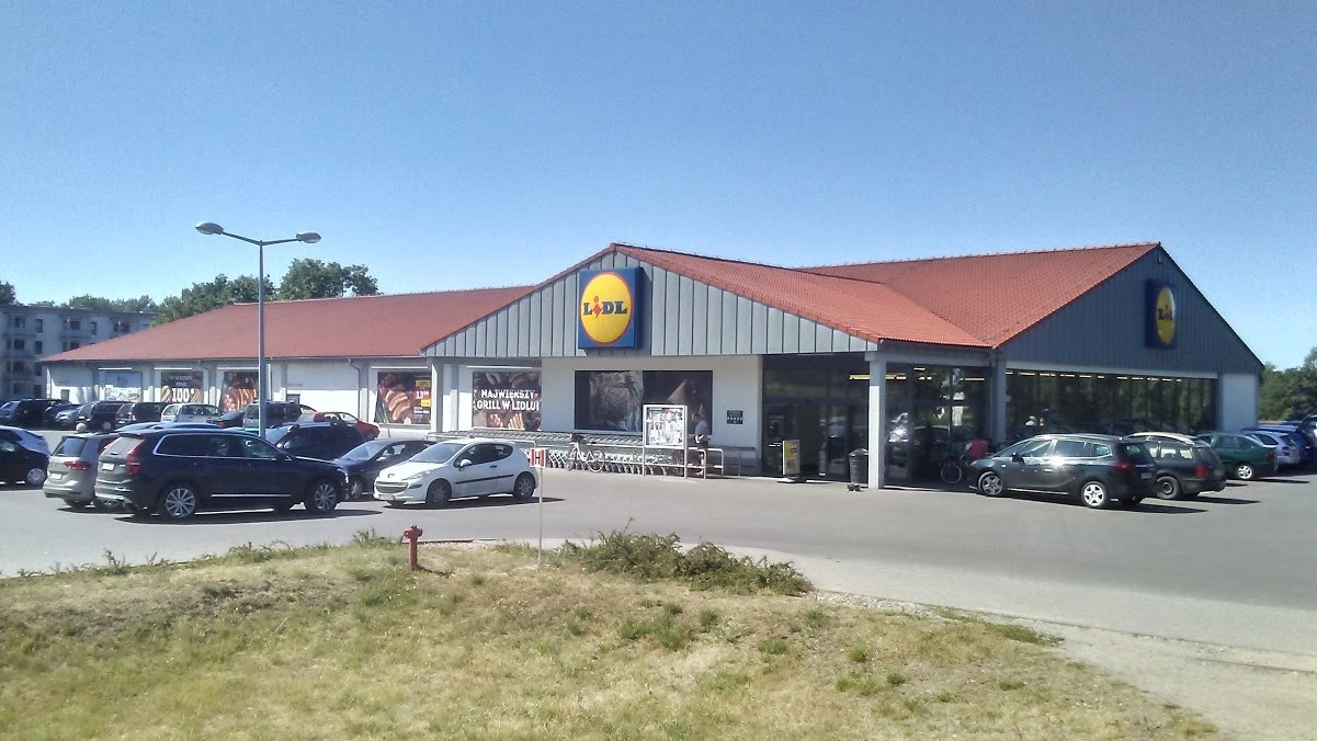 Jeden z dwóch Lidlów w 60-tysięcznym Tomaszowie Mazowieckim, w województwie łódzkim